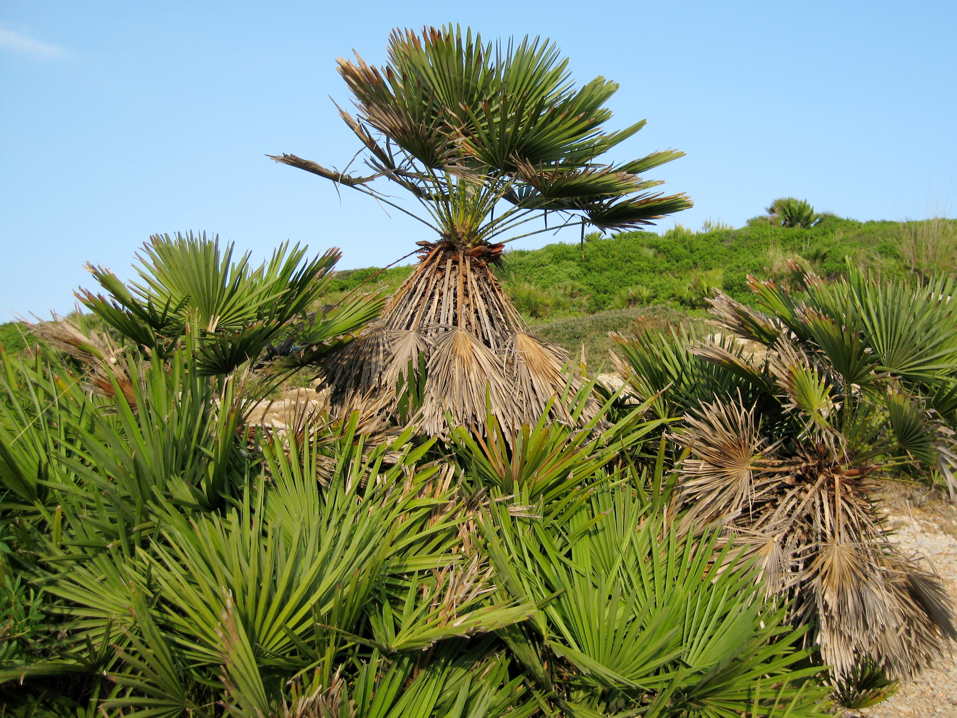 Zwergpalmen (Chamaerops humilis) östlich der Cala Mesquida an der Nordostküste von Mallorca, Spanien